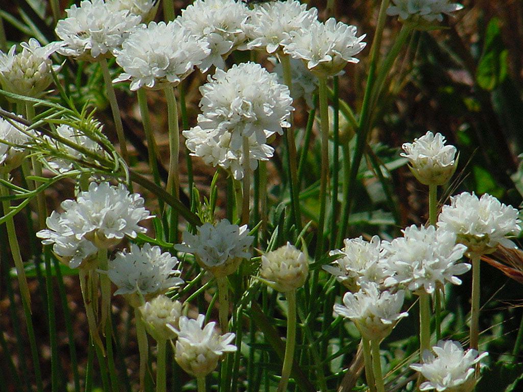 Arméria faux Plantain (Armeria arenaria)